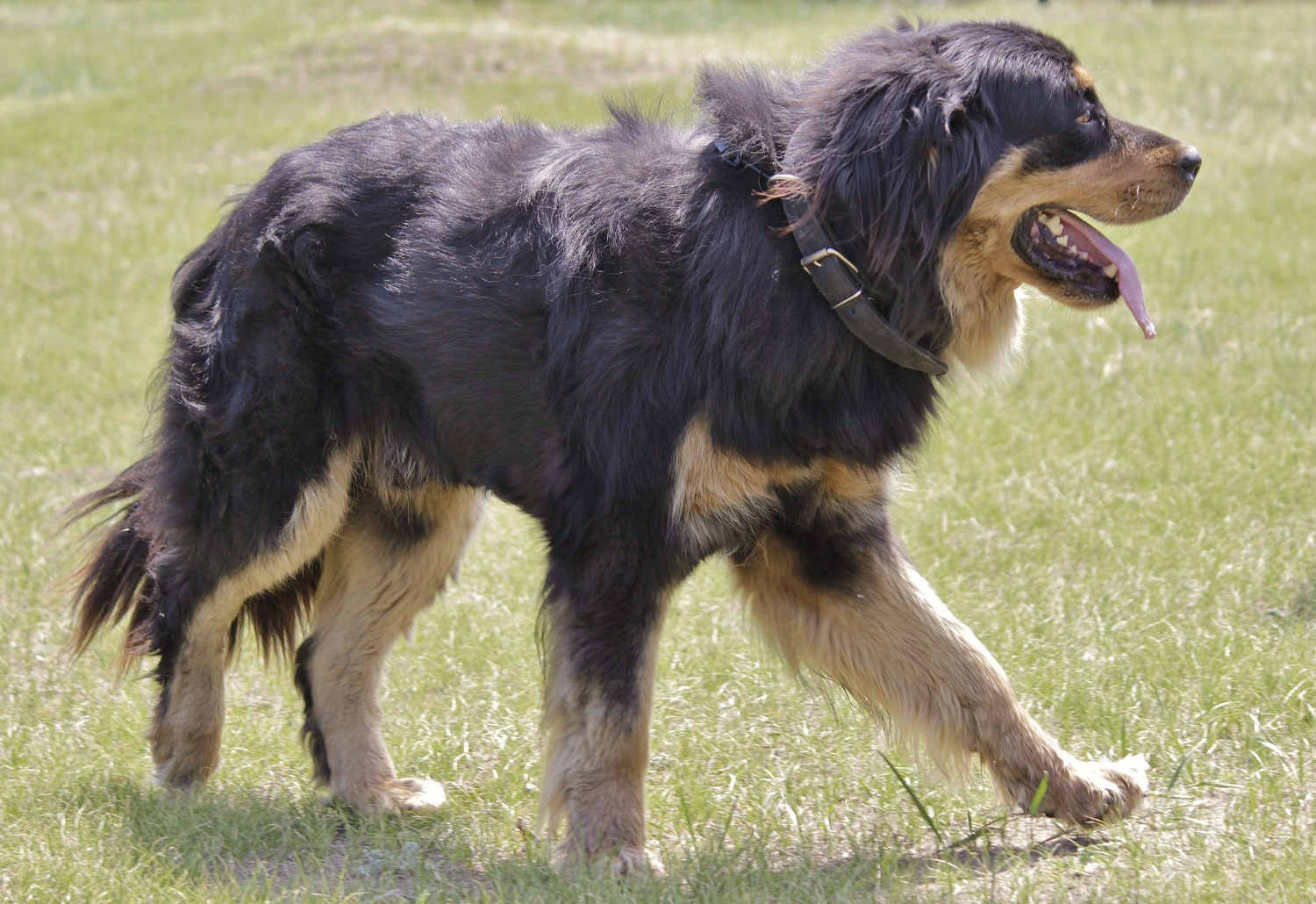 Хотошо - собака хунну